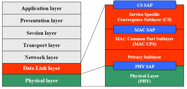 Couche Protocolaire IEEE 802.16